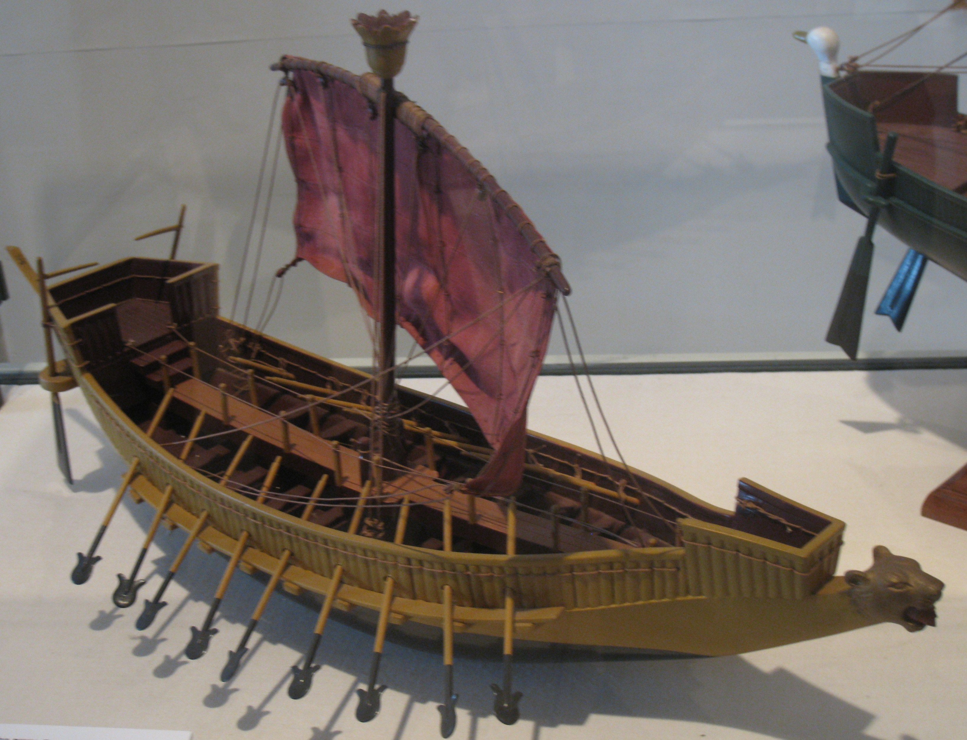 National Maritime Museum, Israel - Ship Models A modern model of an Egyptian warship from 1200 BC. wood. Model built by naval Architect P.Milch and by I. Krupnik המוזיאון הימי הלאומי בחיפה דגמי ספינות דגם מודרני של ספינת מלחמה ממצרים העתיקה. ספינות מסוג זה היו בשימוש בשנת 1200 לפני הספירה. הדגם, מעשה ידי האדריכל הימי פ. מילך ובידי י. קרופניק